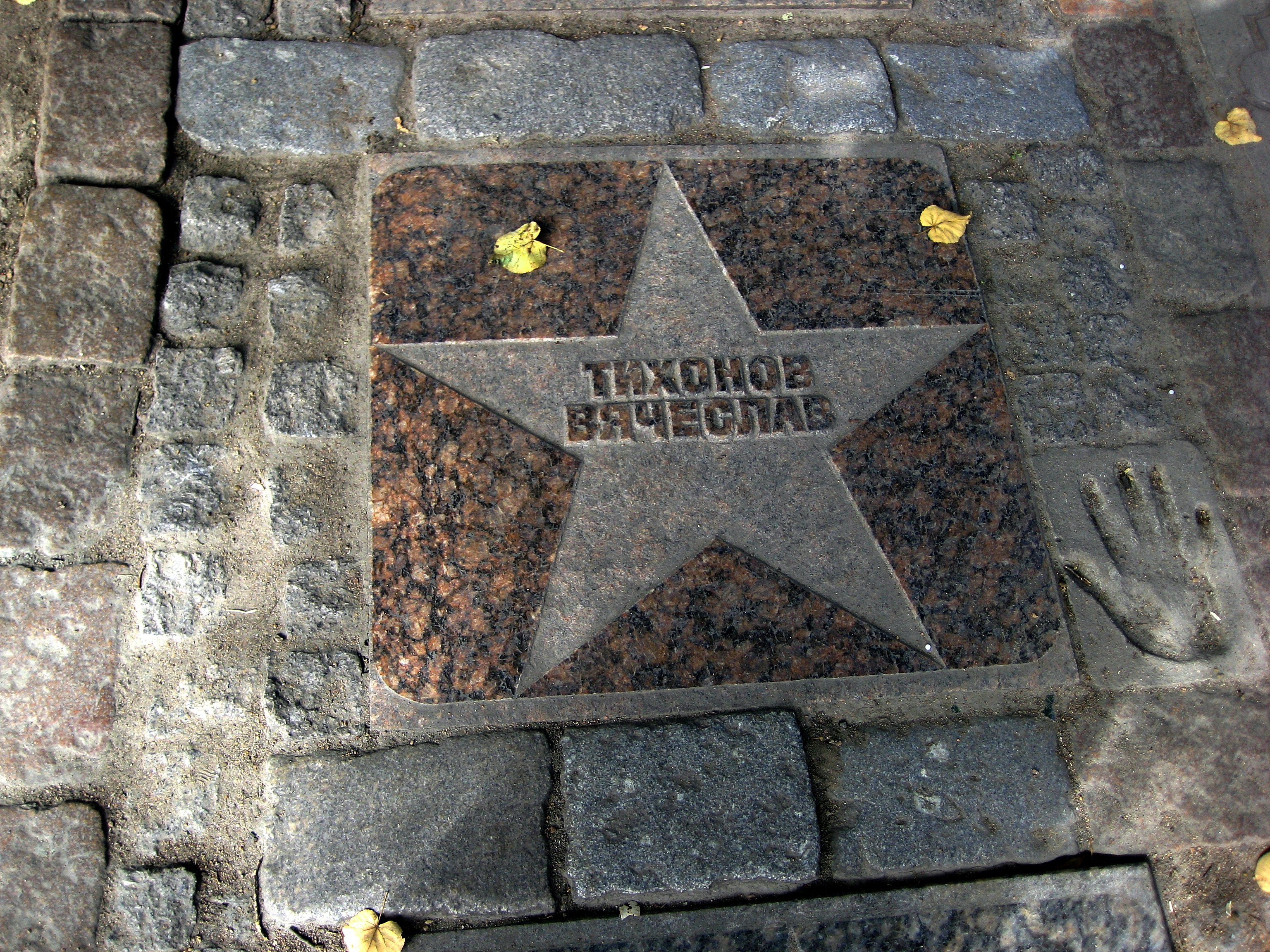 Выборг. Крепостная улица. Плита участника выборгского кинофестиваля киноактера Вячеслава Тихонова на Аллее актерской славы.